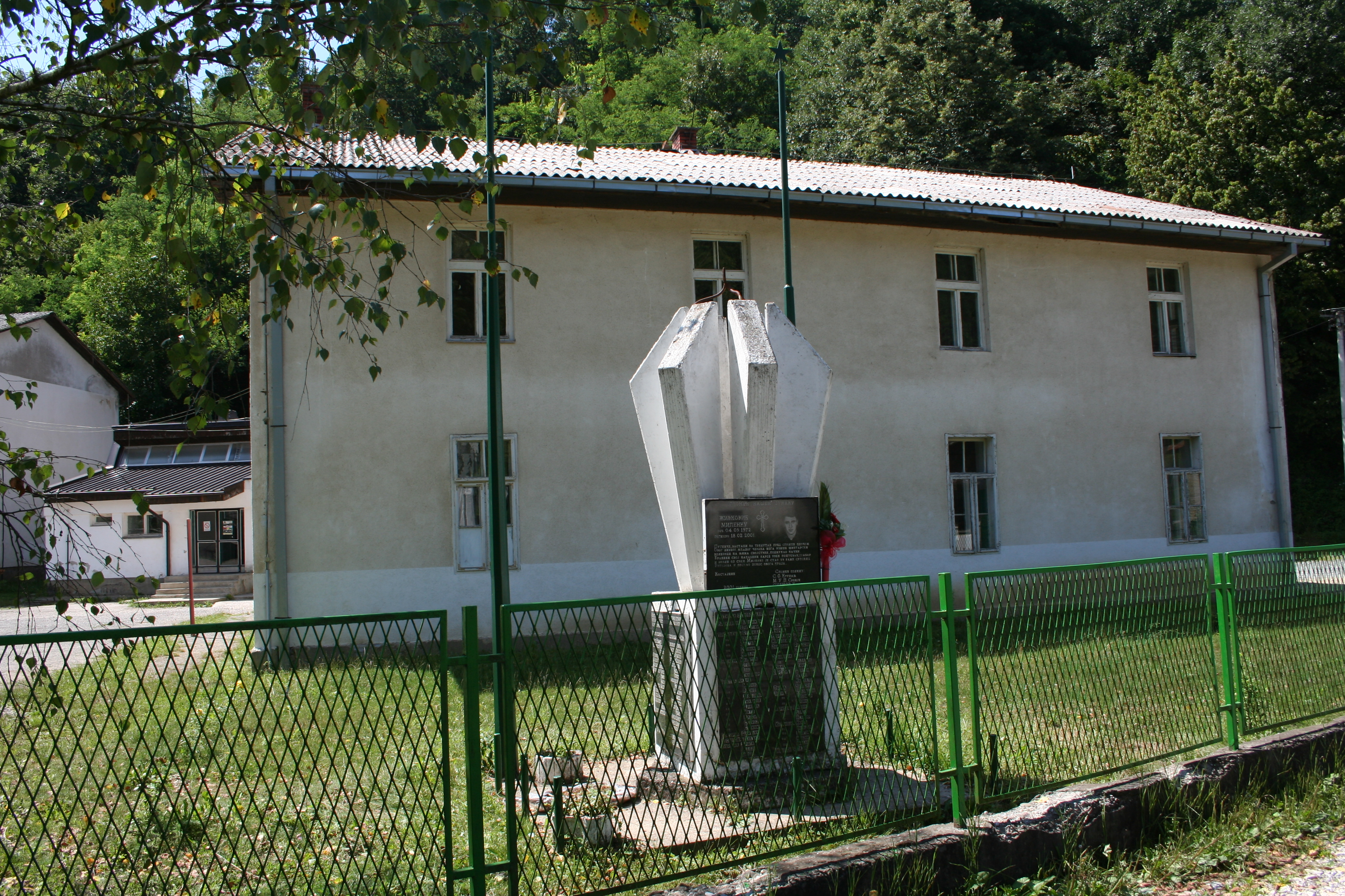 Zgrada škole, Kostajnik